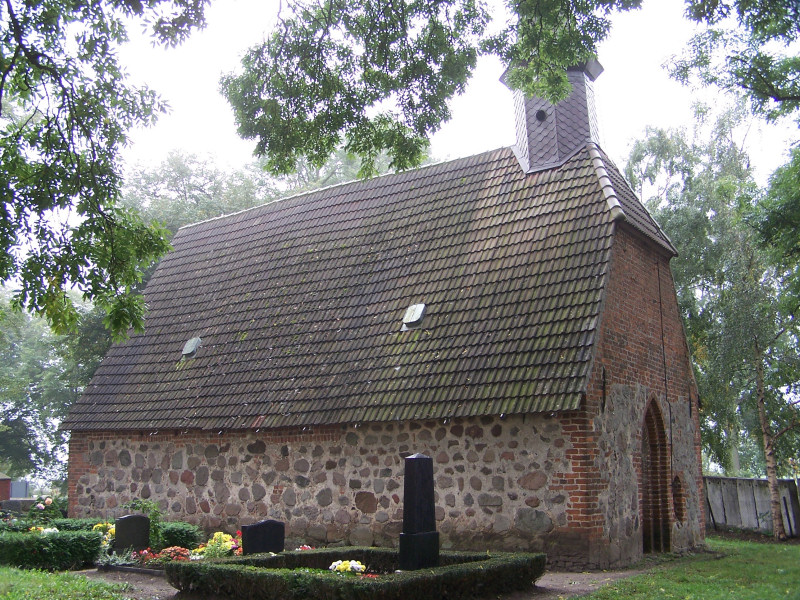 Kirche in Weitendorf, Mecklenburg-Vorpommern